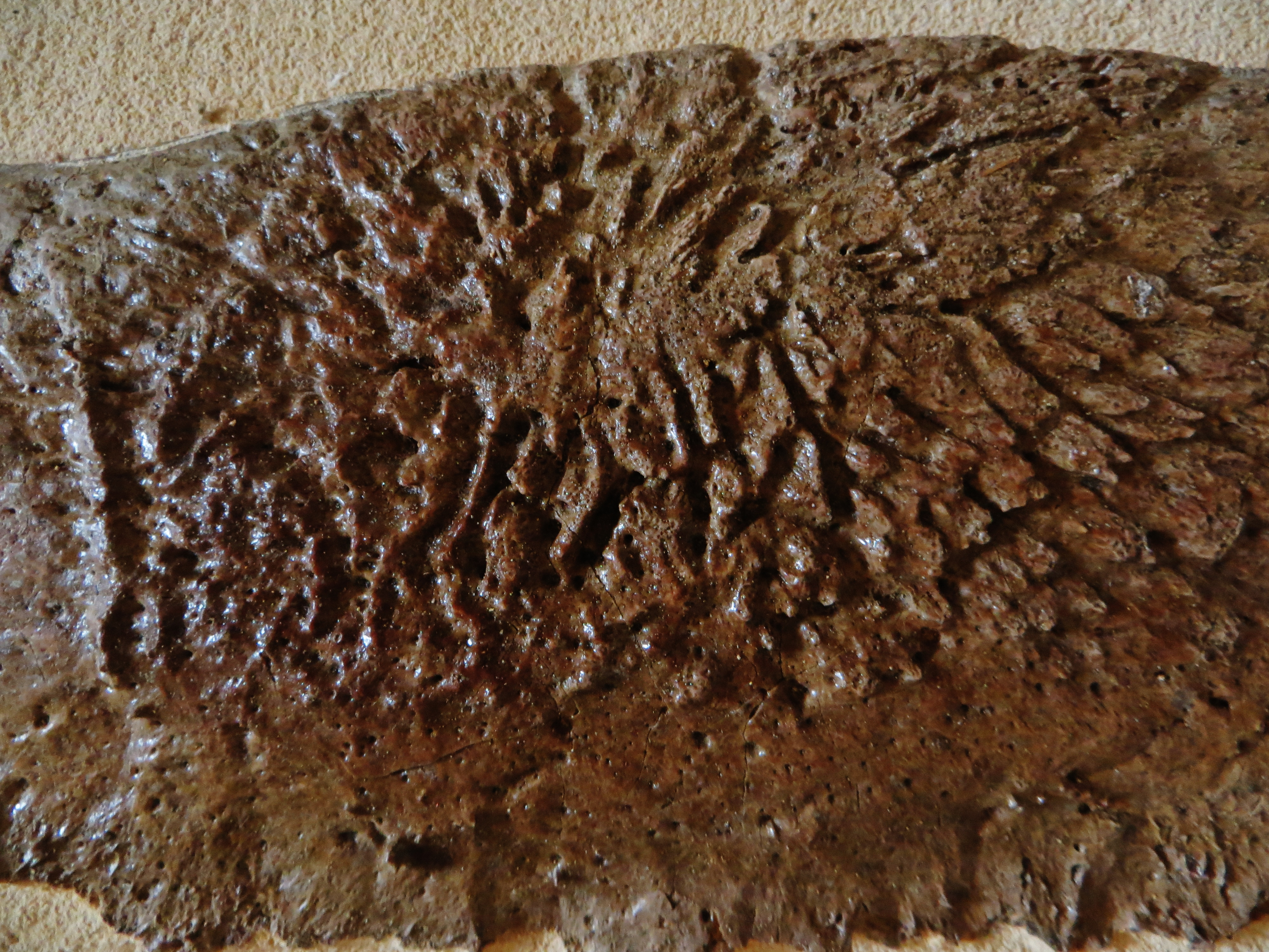 Fossil- Took the picture at Teylers Museum, Haarlem